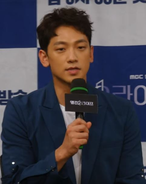 5일 오후 서울시 마포구 상암동 MBC에서 MBC 새 월화드라마 '웰컴2라이프' 제작발표회가 열렸다.